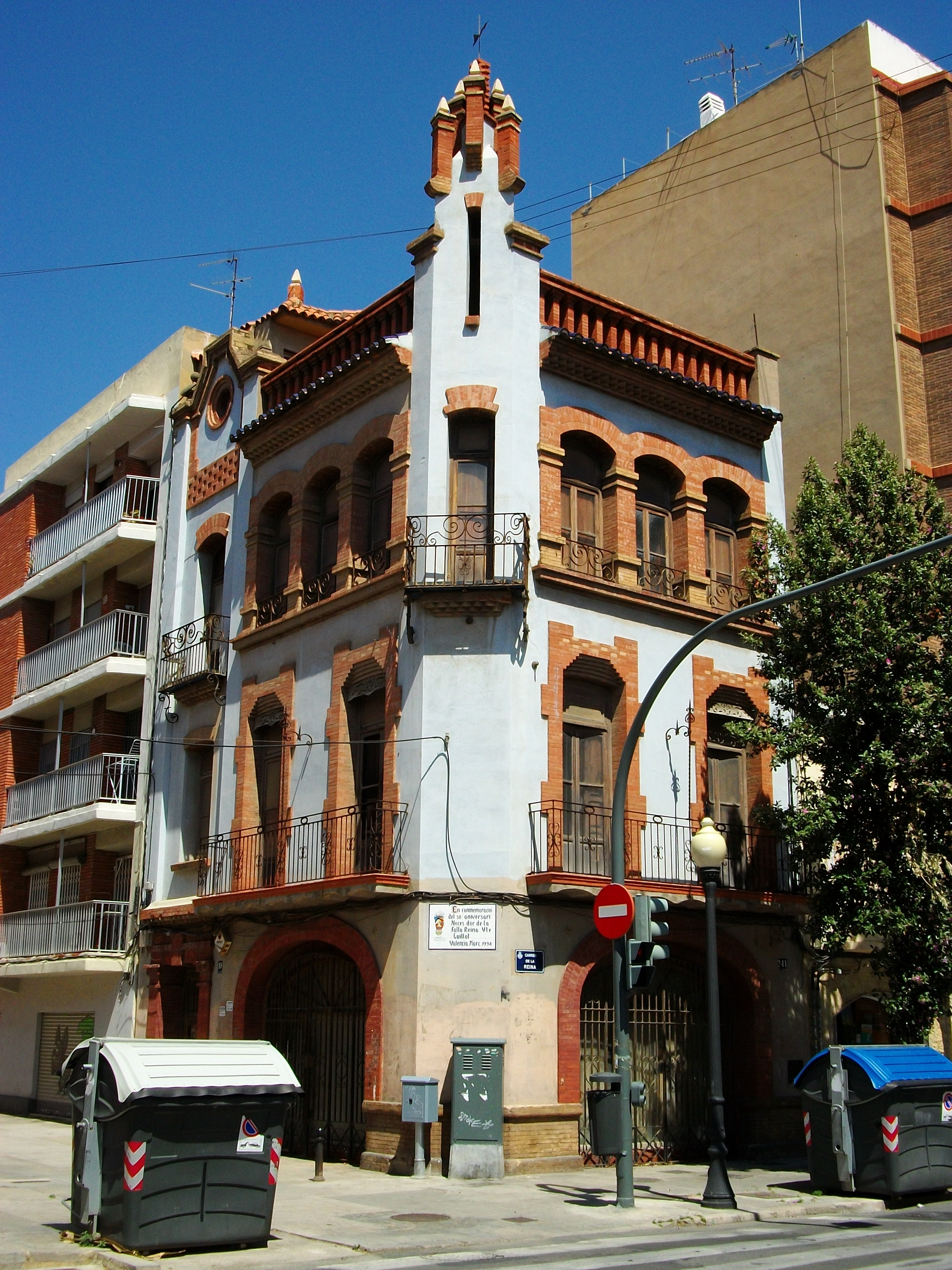 Casa en el carrer de la Reina amb el carrer Vicent Guillot, Cabanyal, País Valencià.